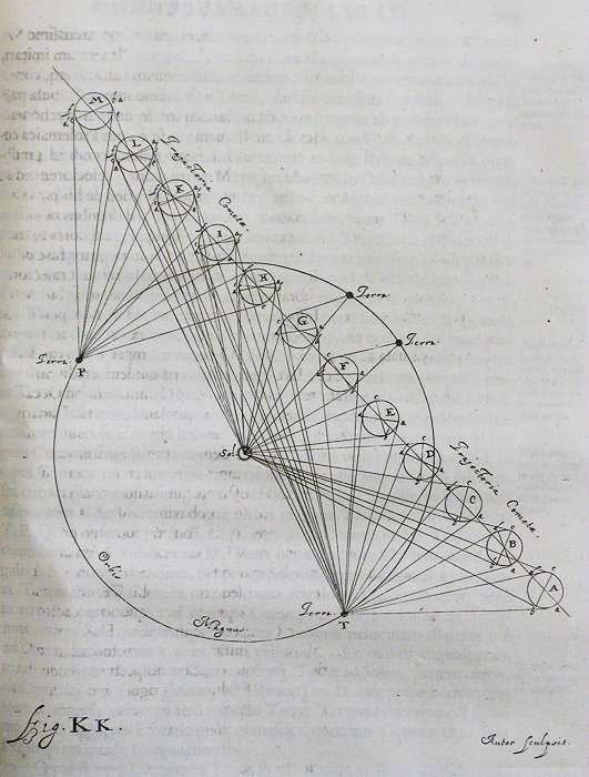 Tavola KK dell'opera Cometographia di Johannes Hevelius